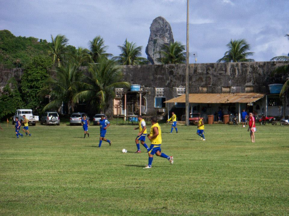 Treino de futebol no Campo Pianão